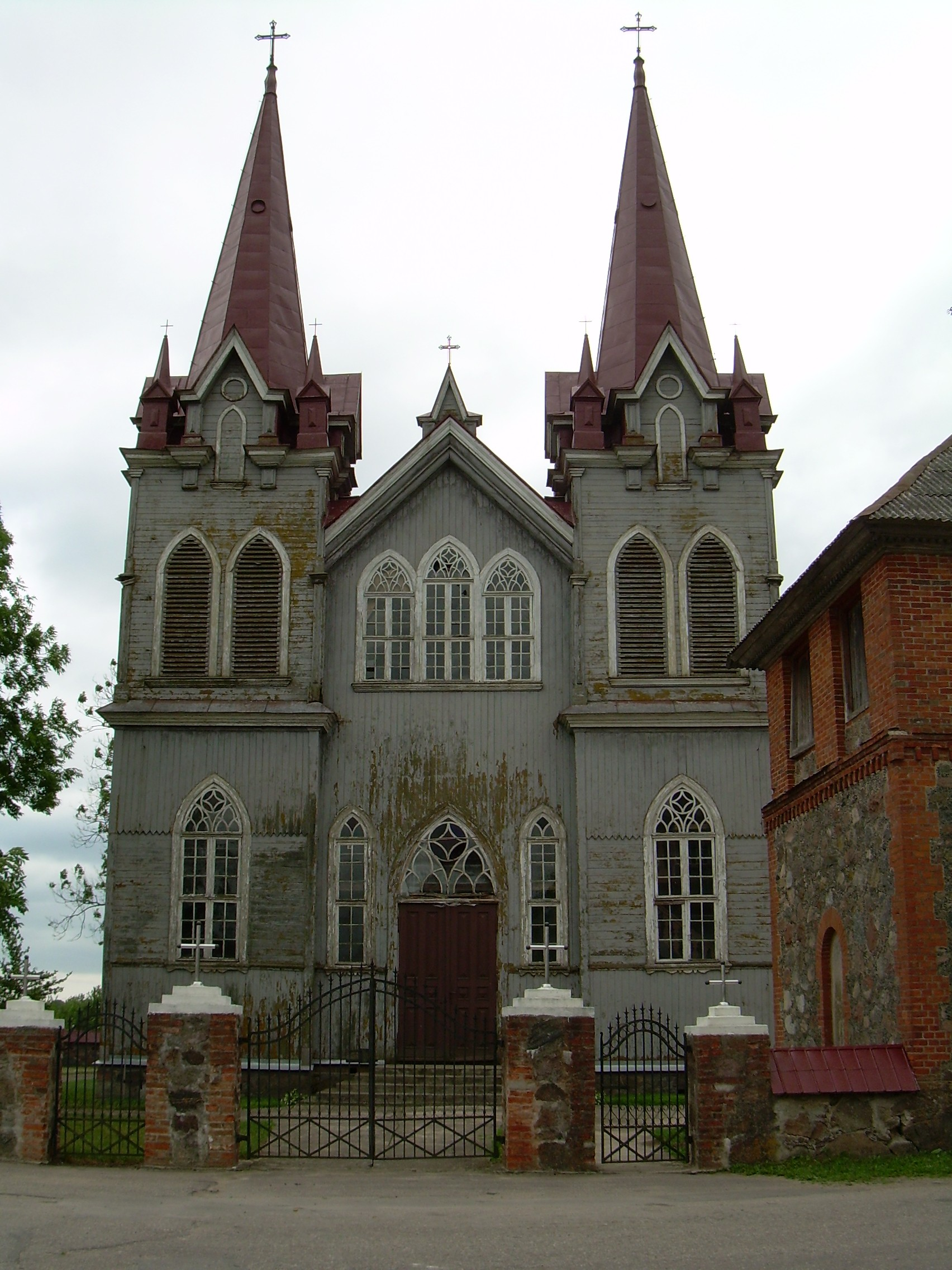 Medingėnų Švč. Trejybės bažnyčia